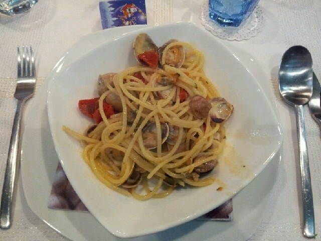 Ristorante a Napoli - Spaghetti alle vongole veraci